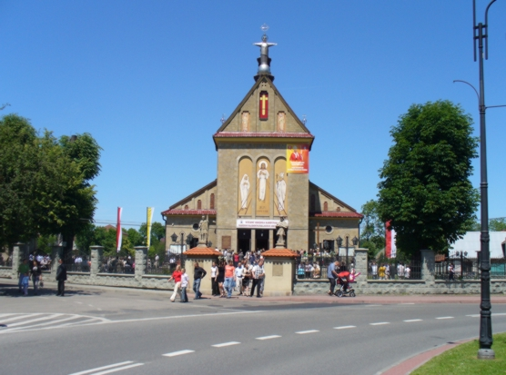 Sułkowice